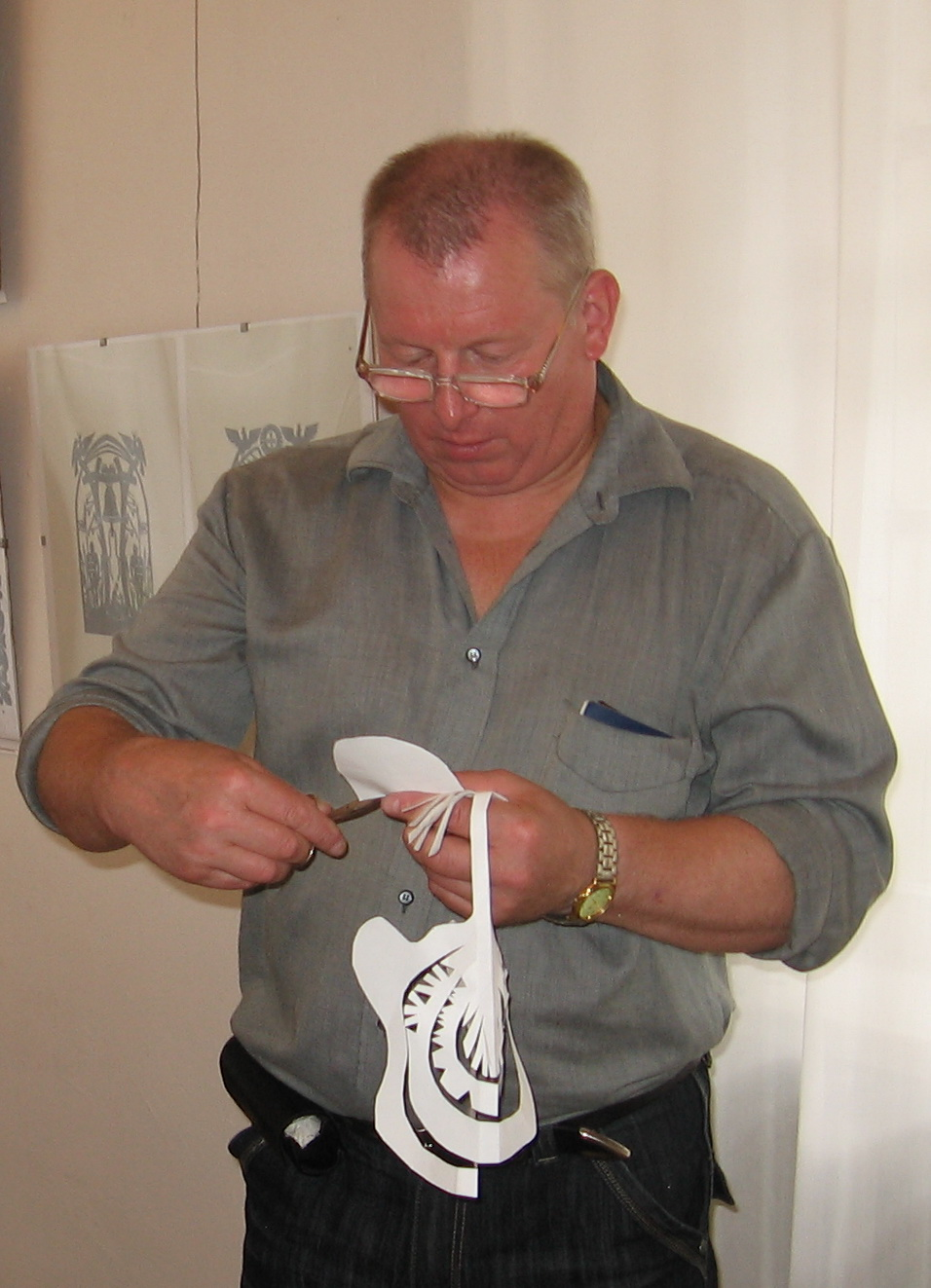 Юры Малышэўскі на майстар-клясе у Пружанскім палацыку